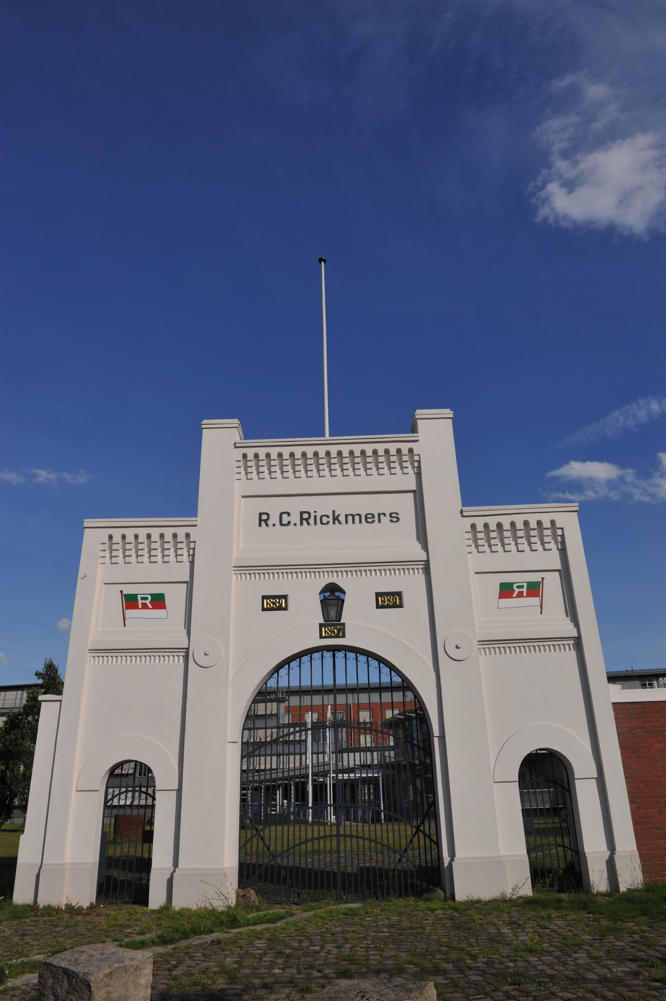 Historical building in Bremerhaven, northern Germany Portal der Rickmerswerft, Paul-Haltenhof-Platz, 1857 Das abgebildete Objekt ist ein geschütztes Kulturdenkmal in der Freien Hansestadt Bremen, mit der Nr. 1556 beim Landesamt für Denkmalpflege registriert.